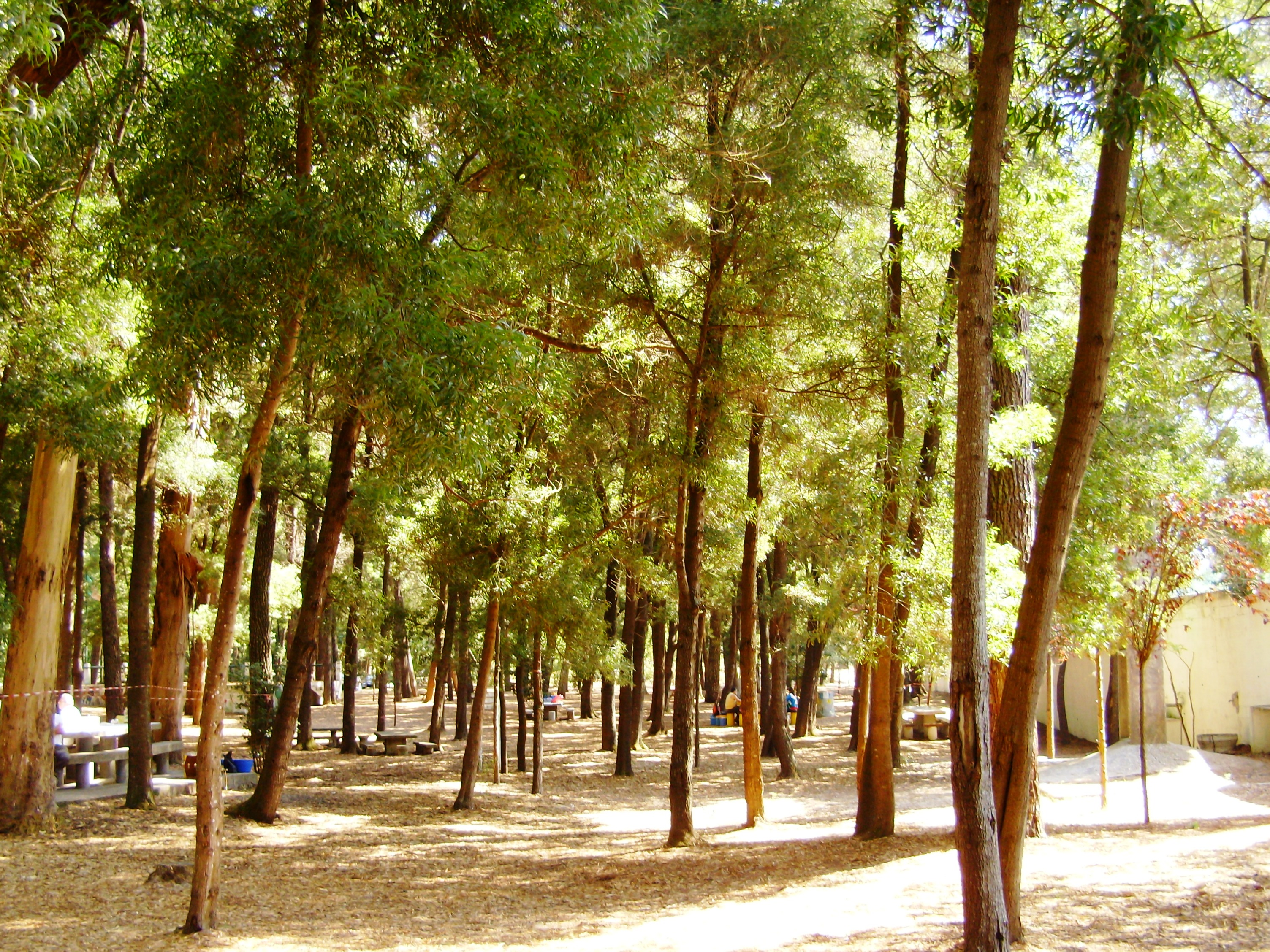 Parque do Buçaquinho, Mata do Buçaquinho, Cortegaça, concelho de Ovar, distrito de Aveiro, Portugal.